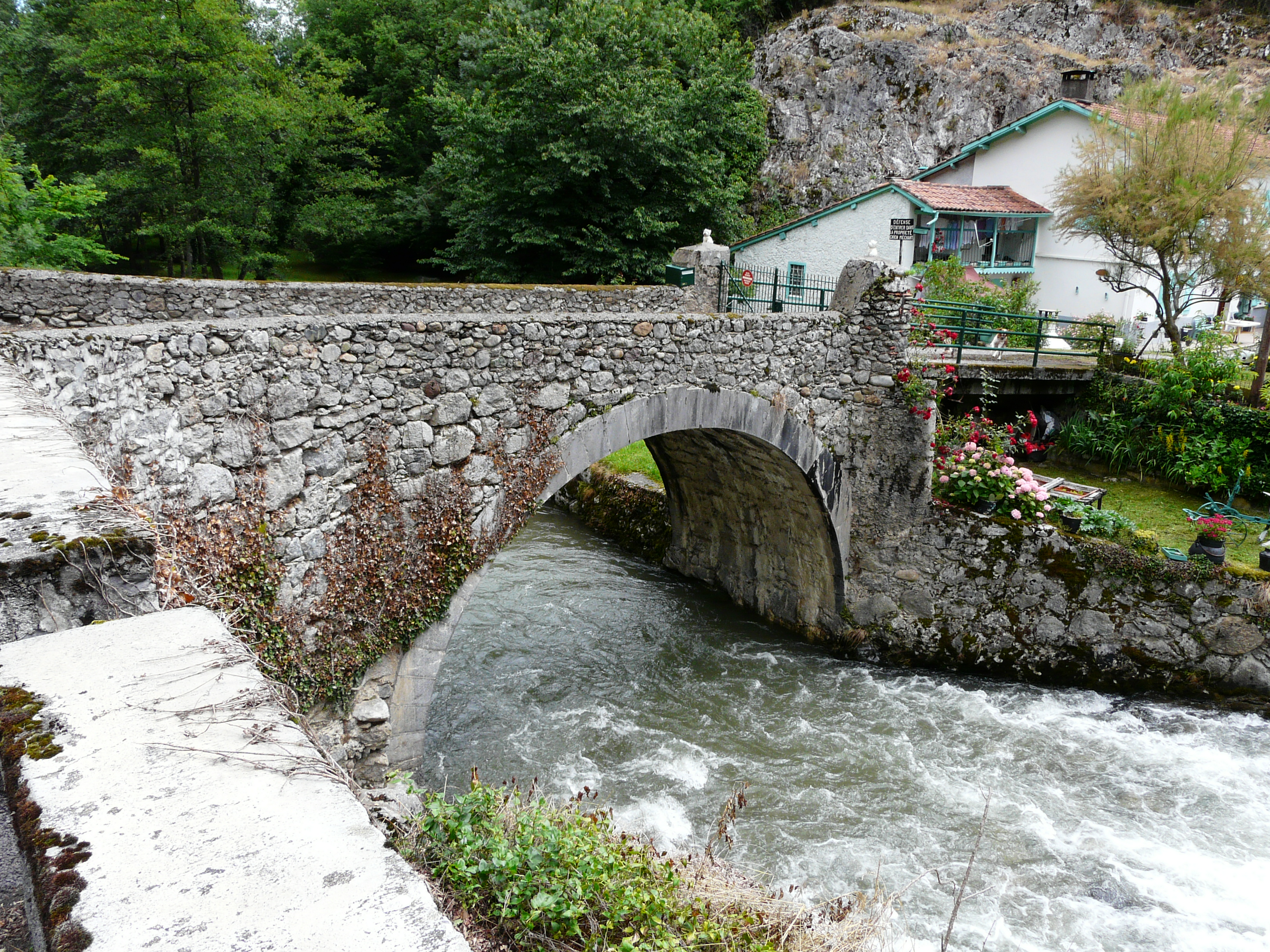 Petit pont sur l'Ourse, Bramevaque, Hautes-Pyrénées, France.